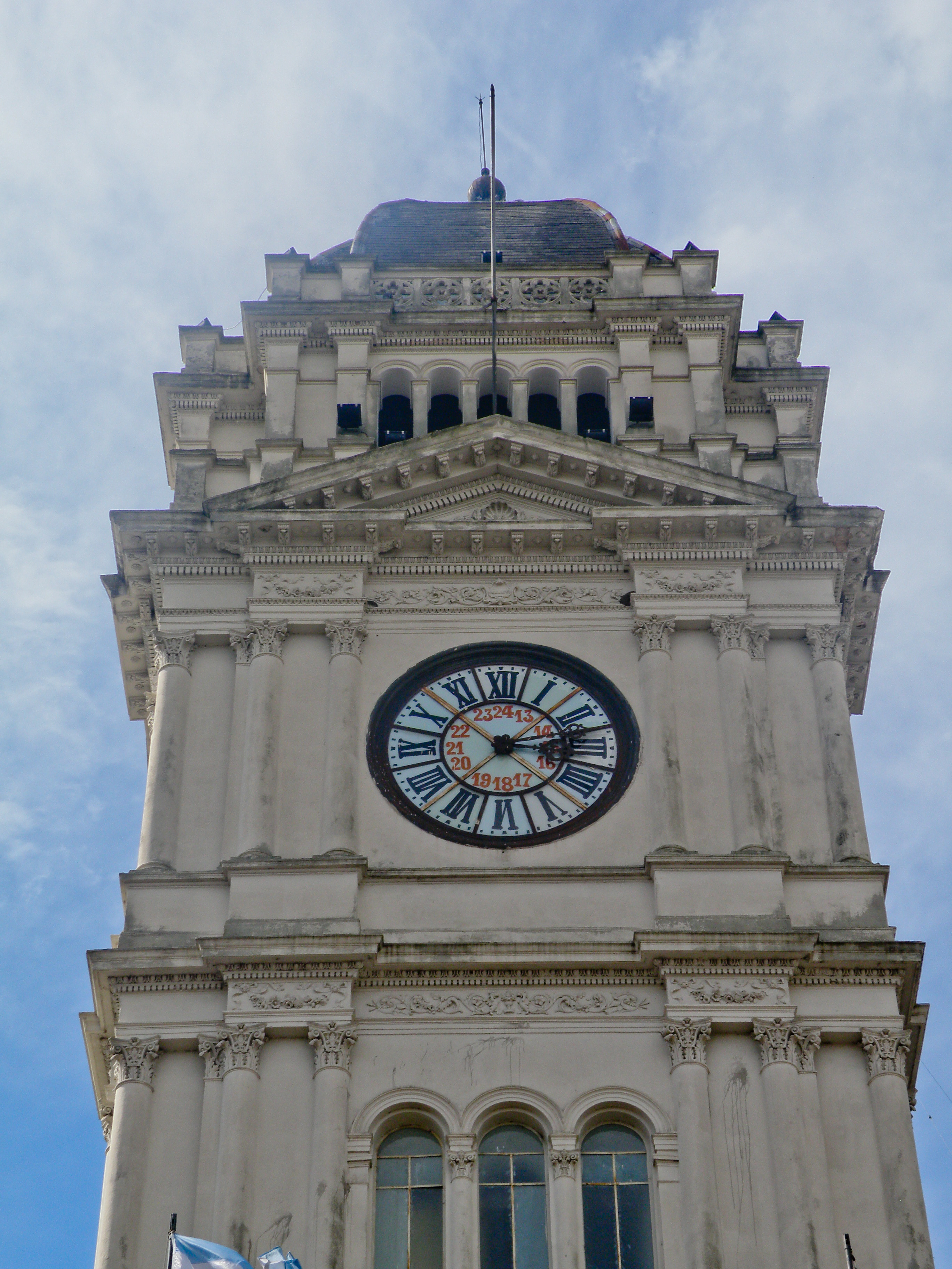 La Casa de Gobierno de la provincia de Entre Ríos fue declarada monumento nacional por resolución del año 1986. En 1884, el gobernador de la provincia, General Eduardo Racedo, encomendó al jefe del departamento topográfico, Don Bernardo Rigolli, el proyecto de una casa de gobierno encargada de centralizar los poderes ejecutivo y legislativo. La obra, concebida a modo de palacio europeo, se encuentra coronada por una torre reloj. Este ultimo de procedencia correntina. La casa contratista encargada de crear el reloj y las campanas fue Ernesto Hoffmann y Augusto Sedner. Augusto Sedner, relojero constructor, combinó el mecanismo en todos sus detalles; ordeno su especial fabricación, y coloco toda la obra en la torre construida íntegramente bajo sus ordenes.